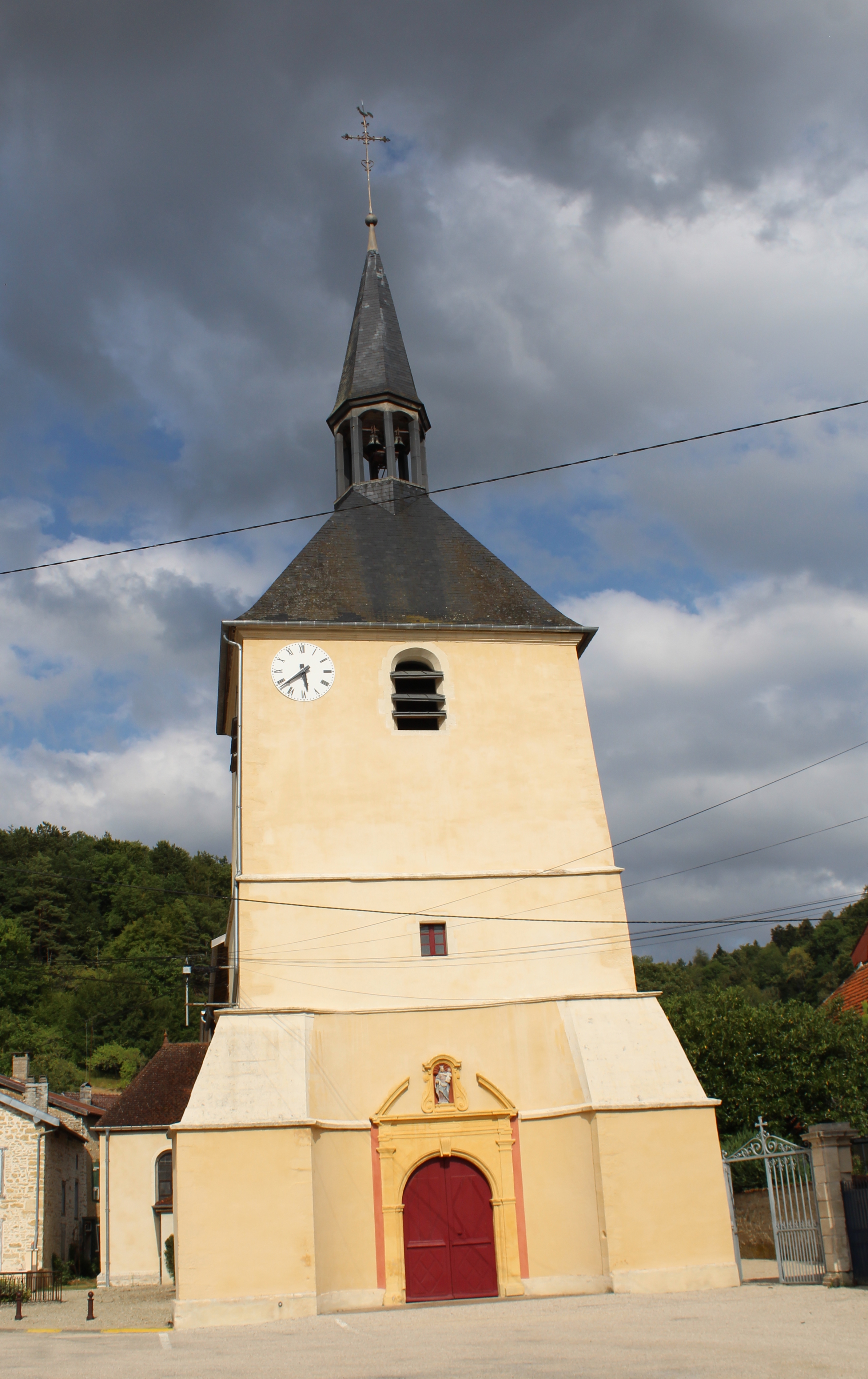 L'église